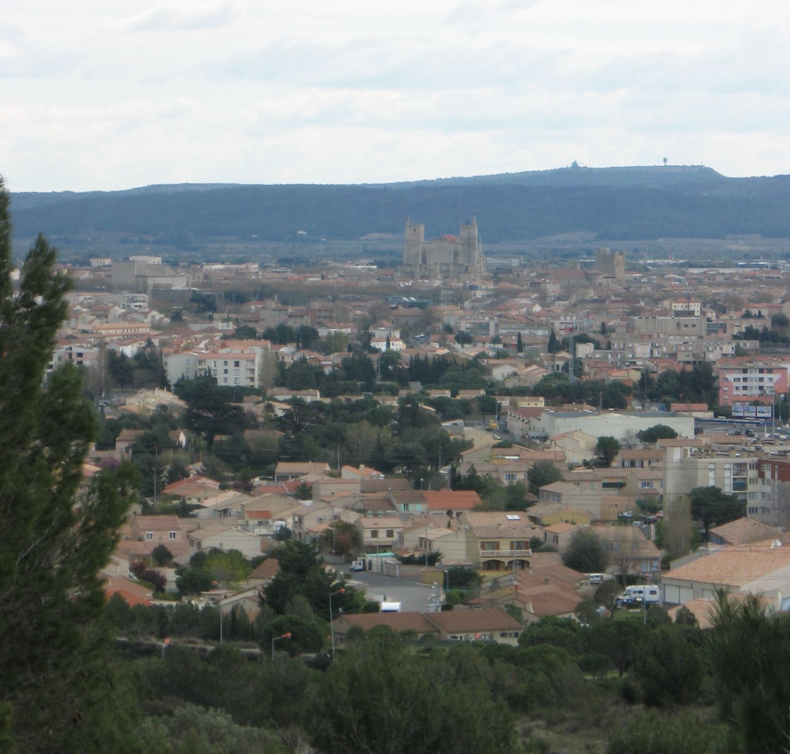 Vue de Narbonne (Aude, France).